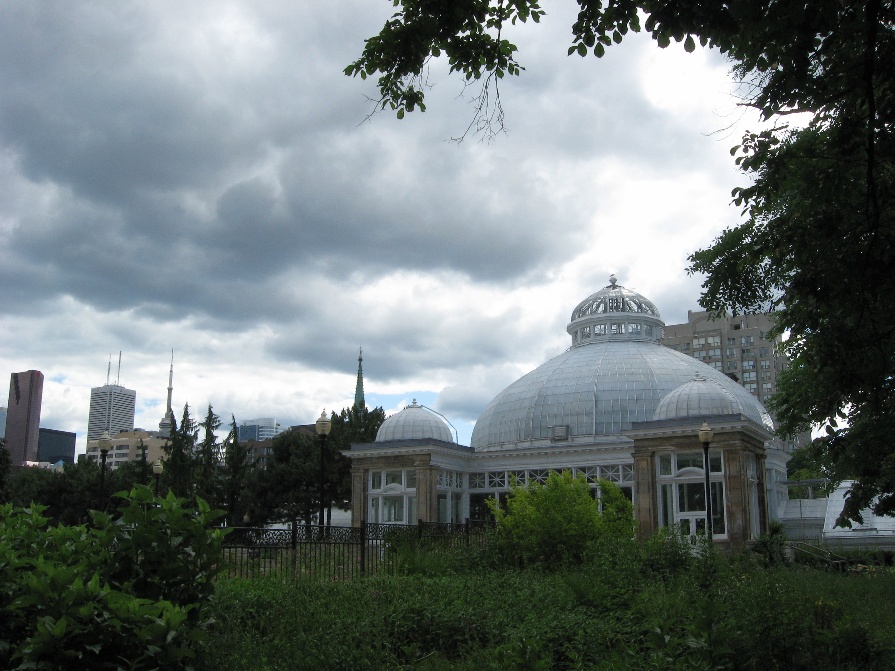 Allan Gardens, Toronto, Ontario, CanadaAllan Gardens Toronto